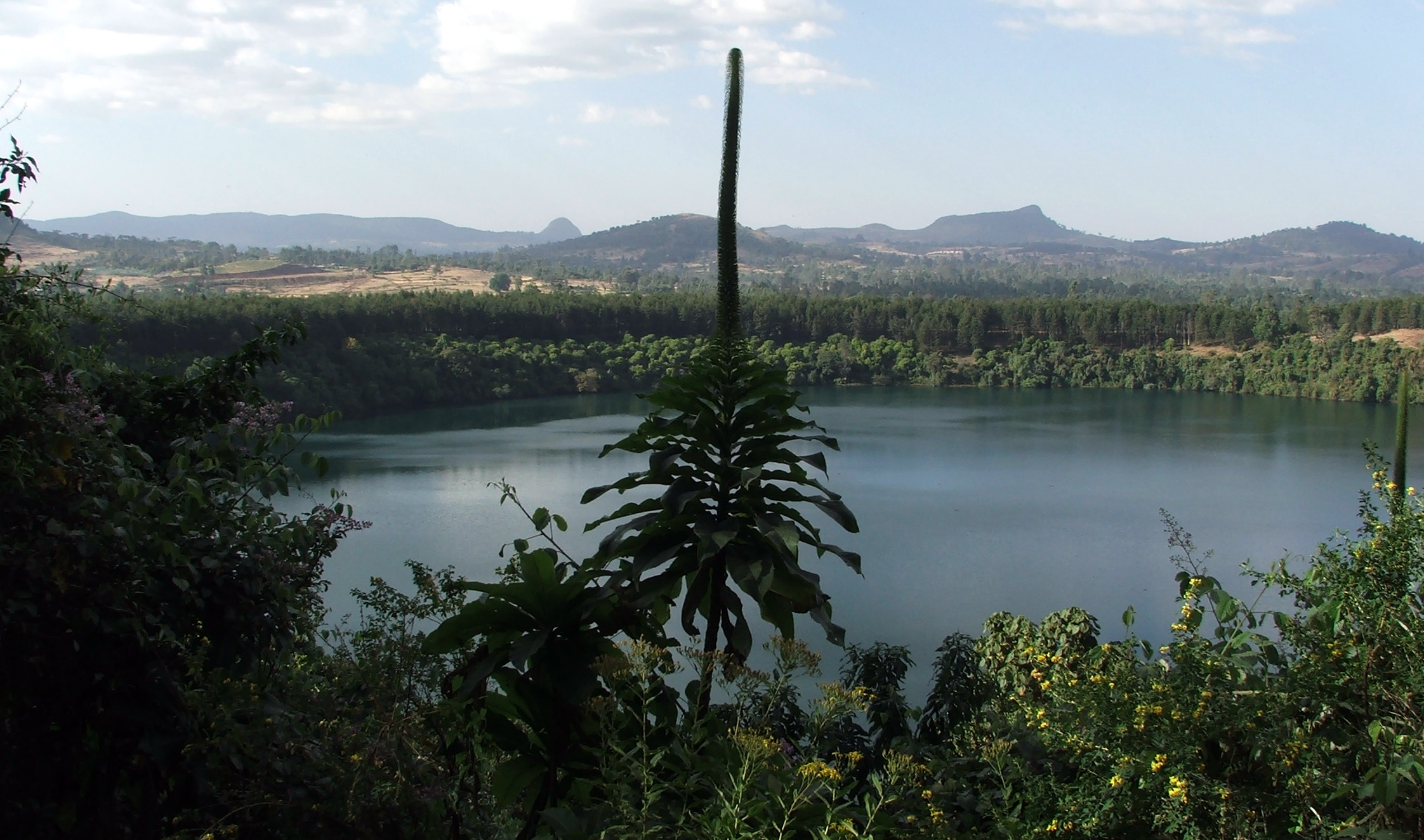 Lake Zengena in Awi Zone, Ethiopia